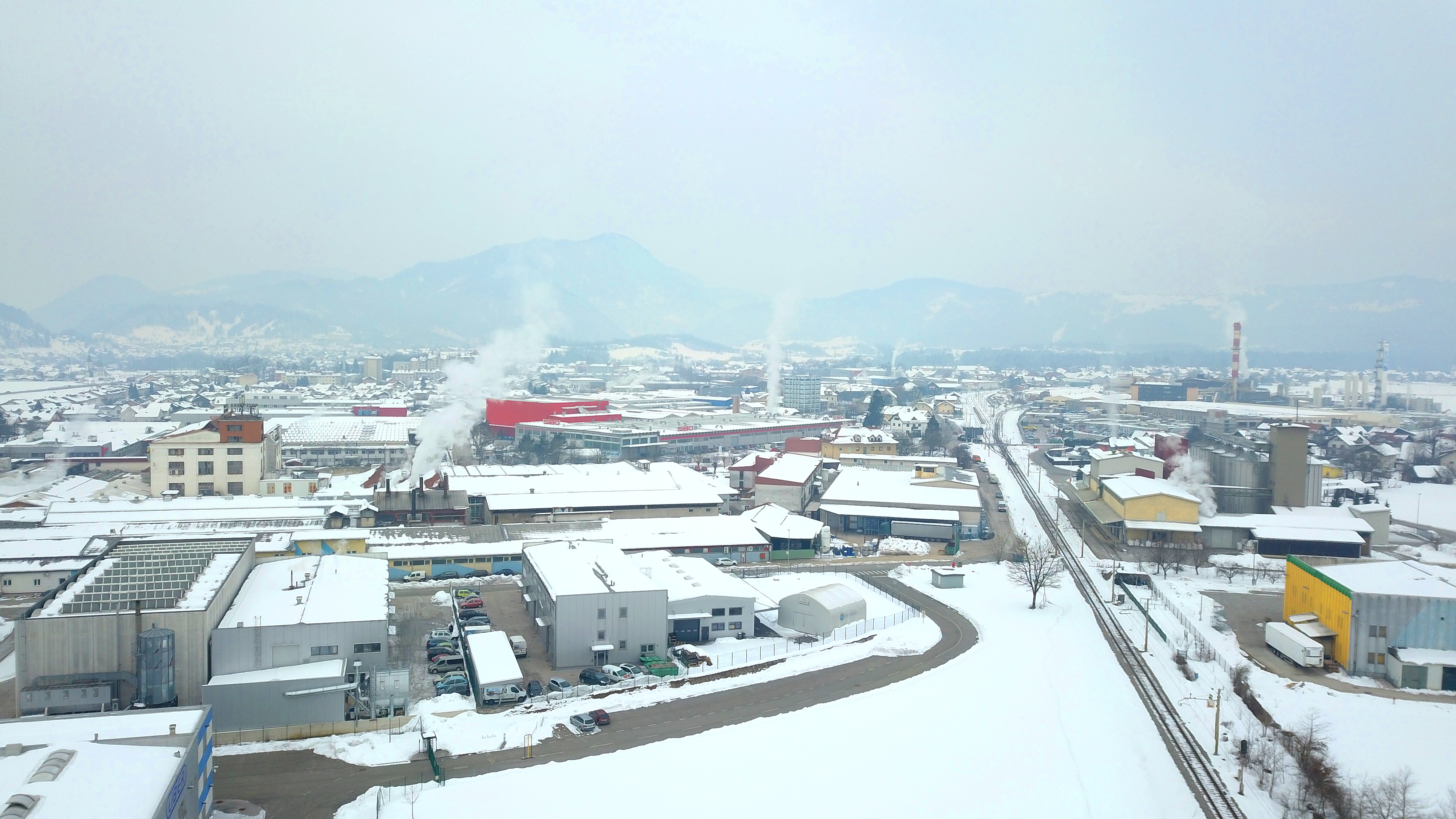 OIC Trata, 4220 Škofja Loka Panoramski posnetek. Na sliki so podjetja MEGUŠAR LES, Okroglo brušenje Bertoncelj David, DO-RAL in druga podjetja. Desno je podjetje Knauf Insulation, d.o.o. Škofja Loka Trata 32, 4220 Škofja Loka. Pred njim je železniška proga relacija Ljubljana (smer dol) - Jesenice (smer gor).